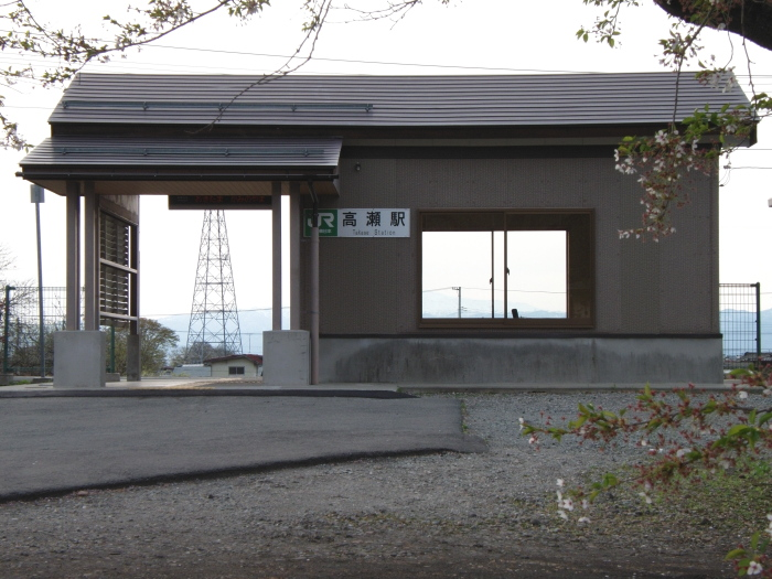 JR Senzan-line Takase Stationja:高瀬駅_(山形県)